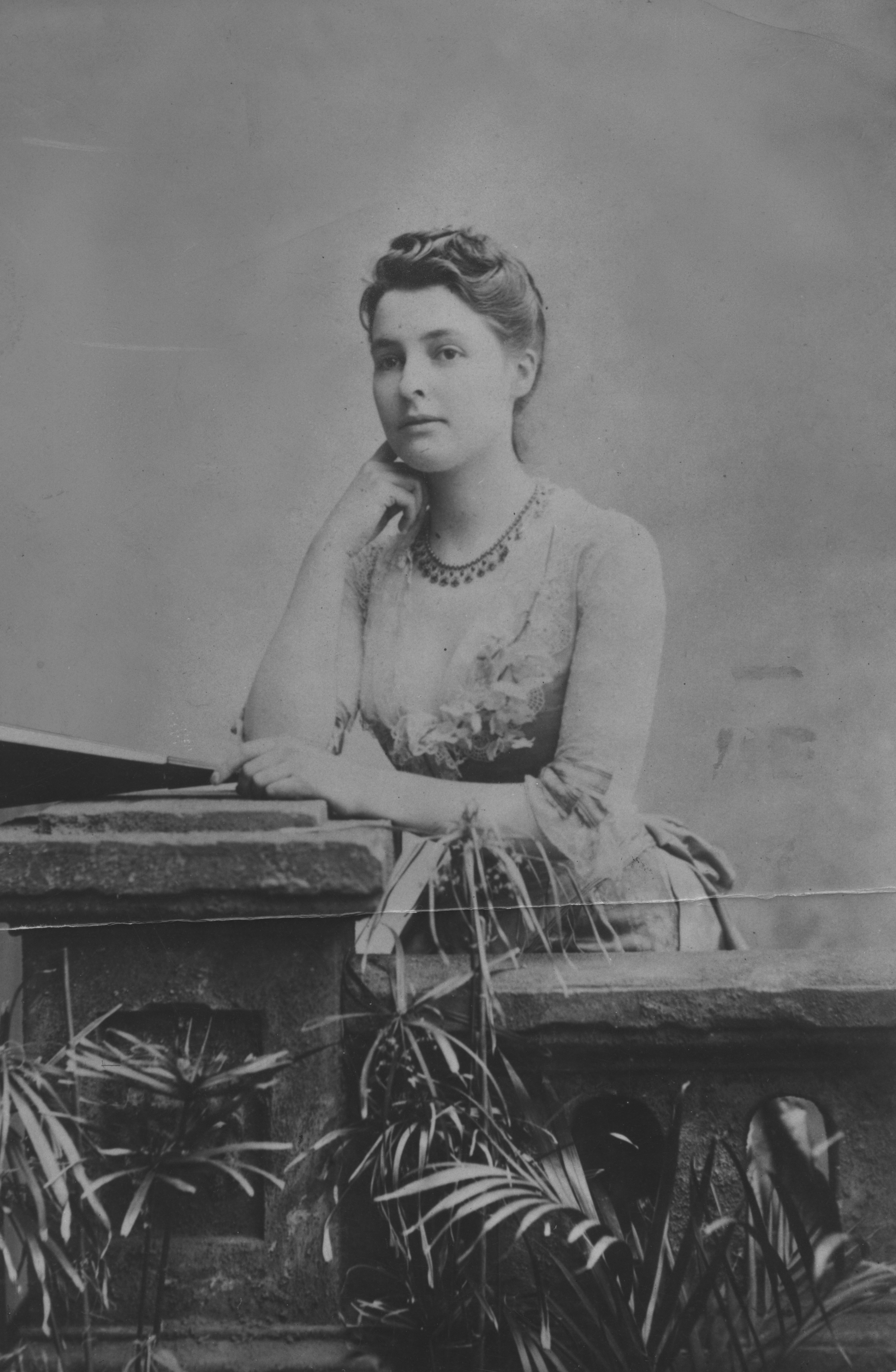 IMAGELIBRARY/71 Persistent URL